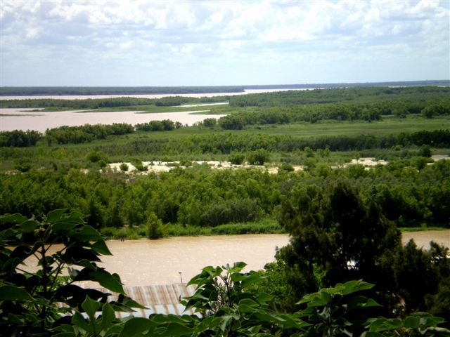 Nationalpark Predelta, Argentinien